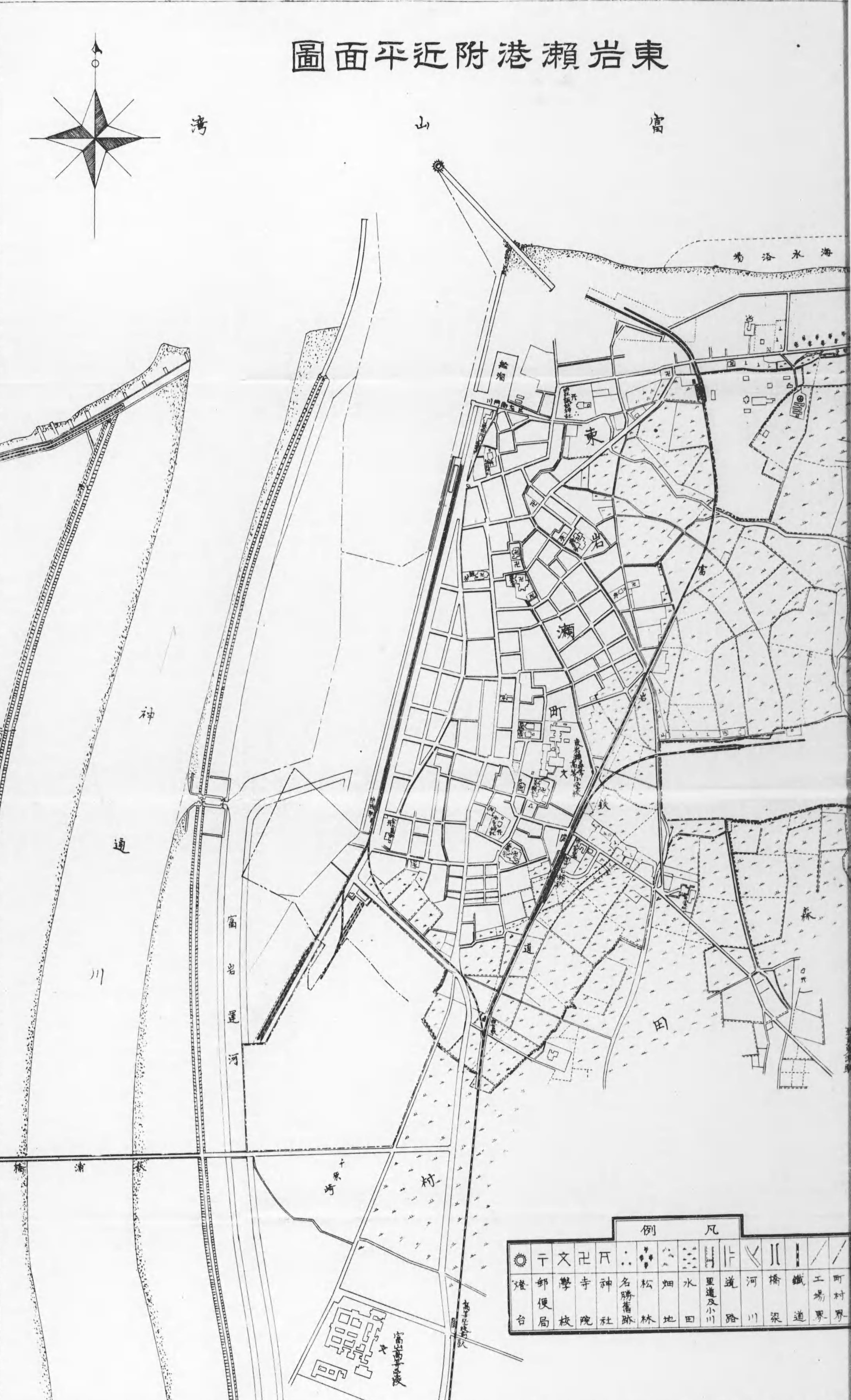 富岩鉄道と当時の沿線の概況を示す地図（富山県東岩瀬町役場、『東岩瀬港 昭和十四年度版』、1939年（昭和14年）6月、富山県東岩瀬町役場）